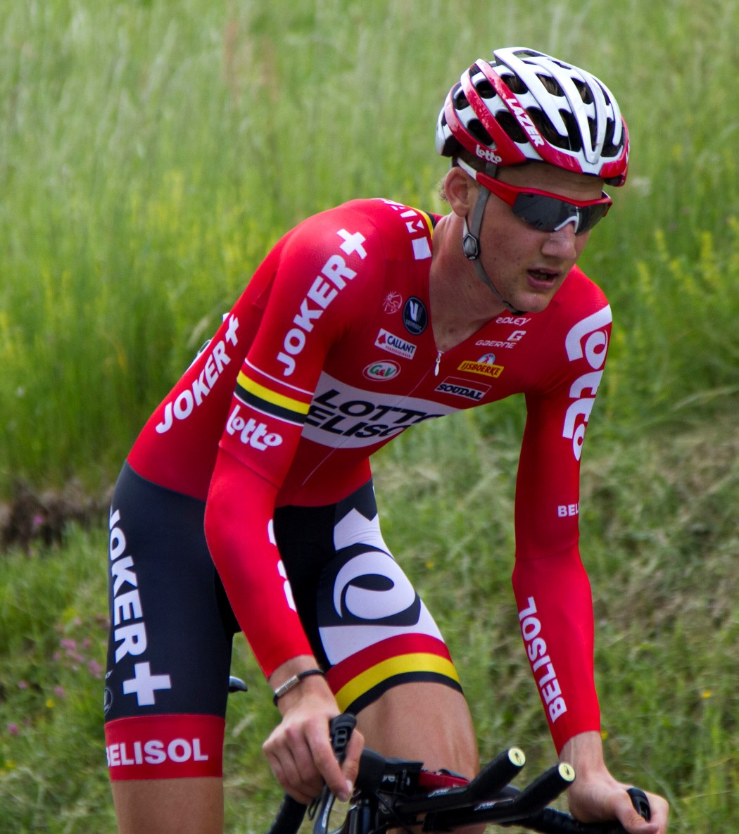 298 tim wellens